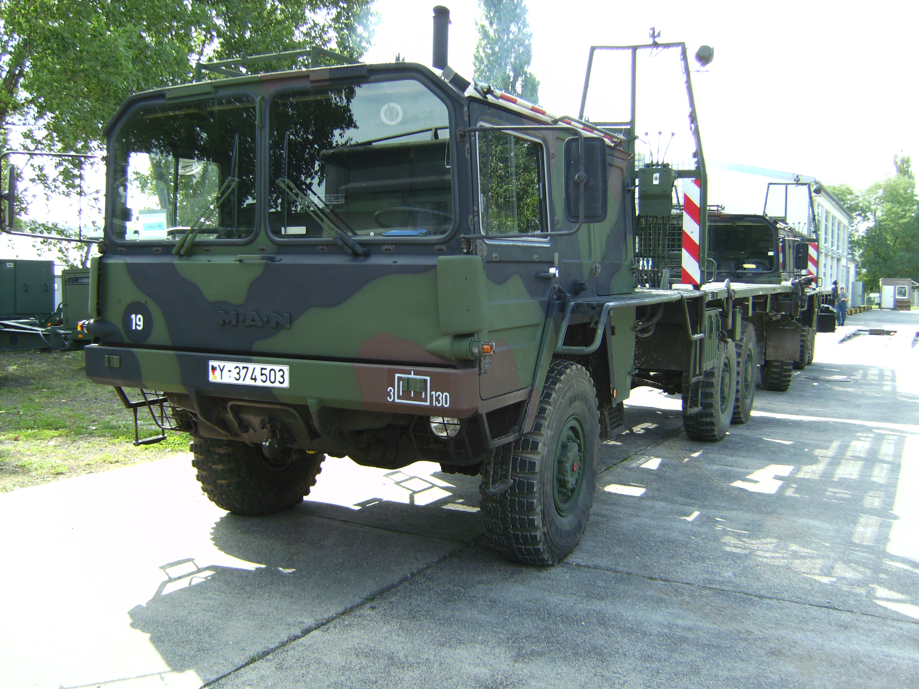 Brückentransporter